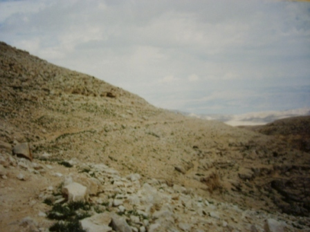 Route romaine de Jérusalem à Jéricho (aussi au second plan, sur la colline à droite). Jésus a dû passer par là.